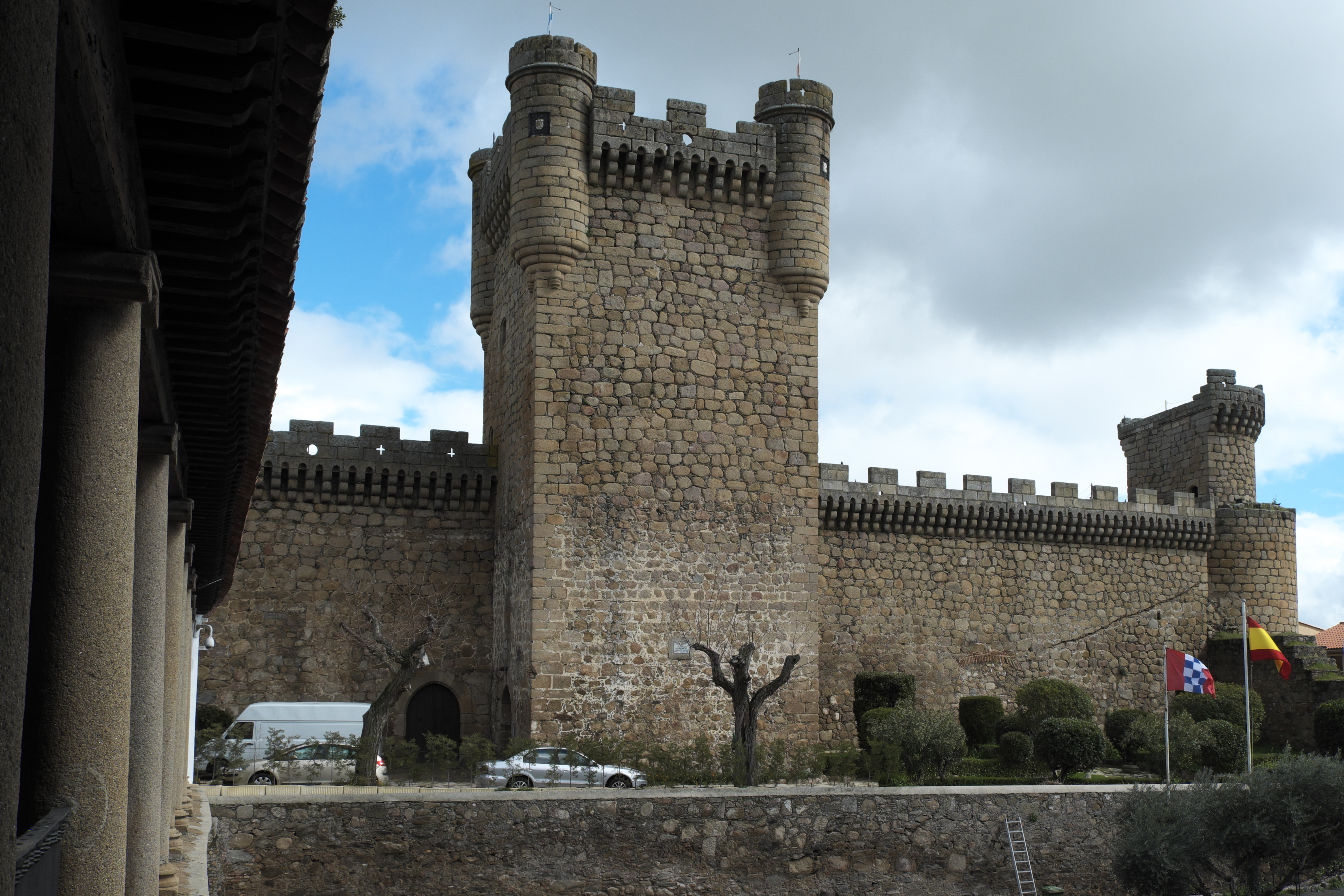 Burg der Grafen von Oropesa aus dem Haus Álvarez de Toledo in Oropesa in der Provinz Toledo (Kastilien-La Mancha/Spanien)